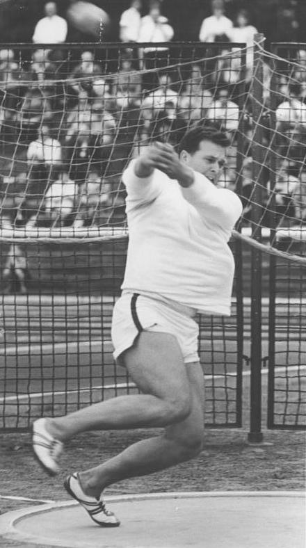 Manfred Losch Zentralbild Wendorf 12.07.1964 Jena: XV. Deutsche Leichtathletik-Meisterschaften. Mit dem dritten Wettkampftag gingen die XV. Deutschen Leichtathletik-Meisterschaften am 12.07.1964 im Jenaer Ernst-Abbes-Stadion zu Ende. UBz: Mit der guten Weite von 64,36 m wurde Manfred Losch (SC DHfK Leipzig) neuer Titelträger im Hammerwerfen. Abgebildete Personen: Losch, Manfred: Hammerwerfer, DDR